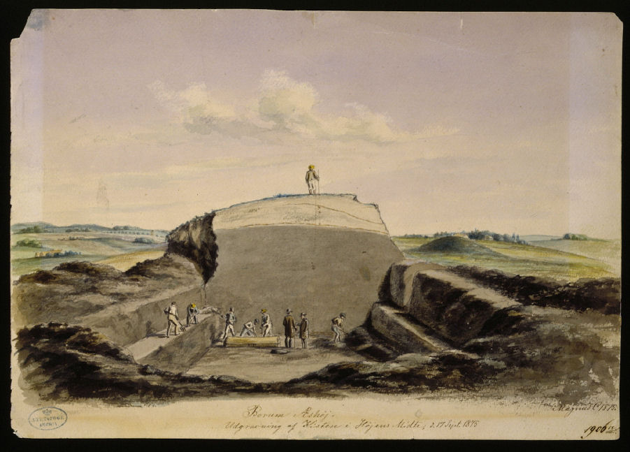 Akvarel af Magnus Petersen. Borum Eshøj, kisten under udgravning i højens midte, d. 17 sept. 1875. Borum sogn, Framlev Herred.